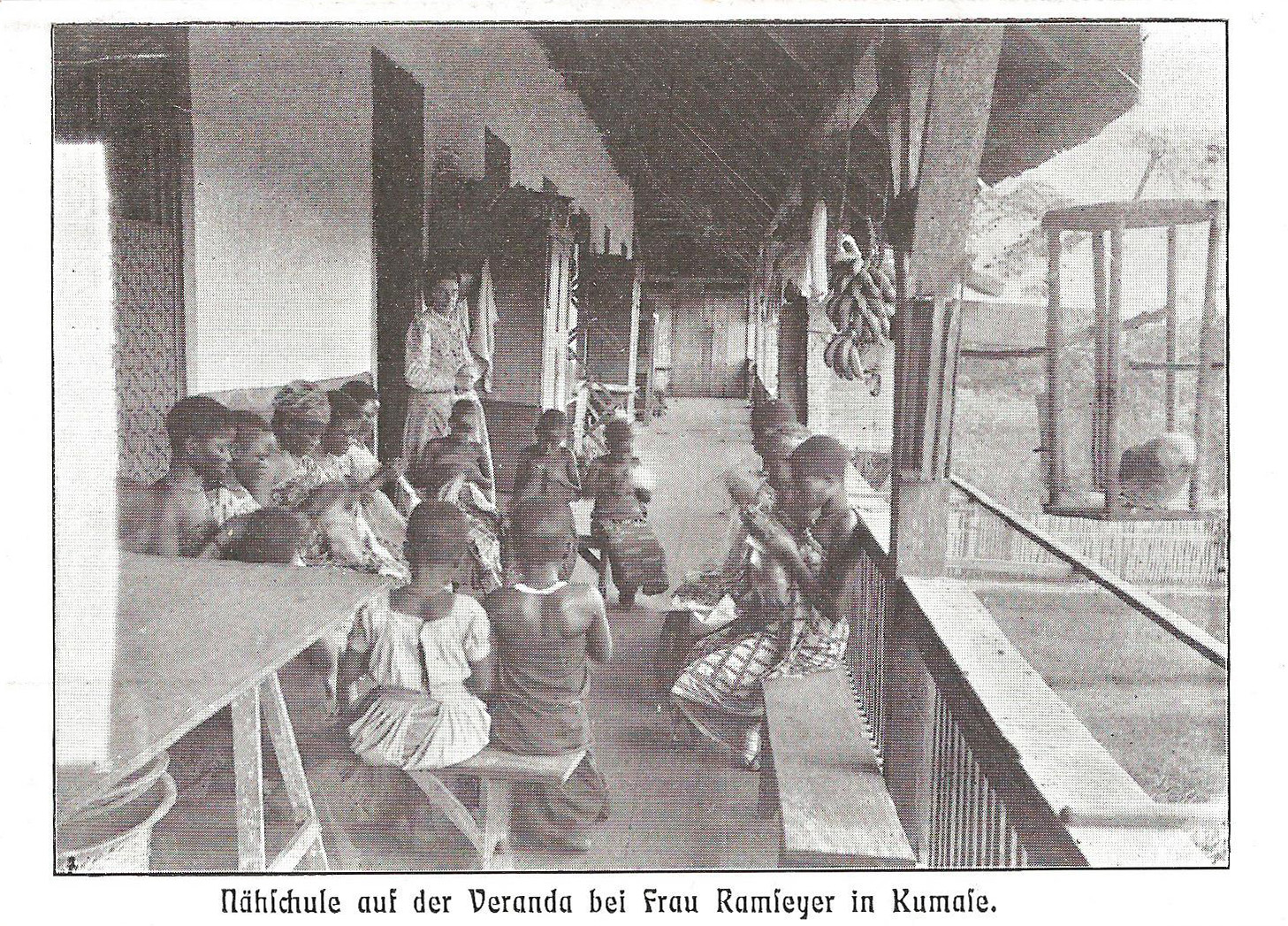 Nähschule auf der Veranda bei Frau Ramseyer in Kumase.. Carte postale ancienne, sans indication d'auteur, d'éditeur ou de date. Collection particulière